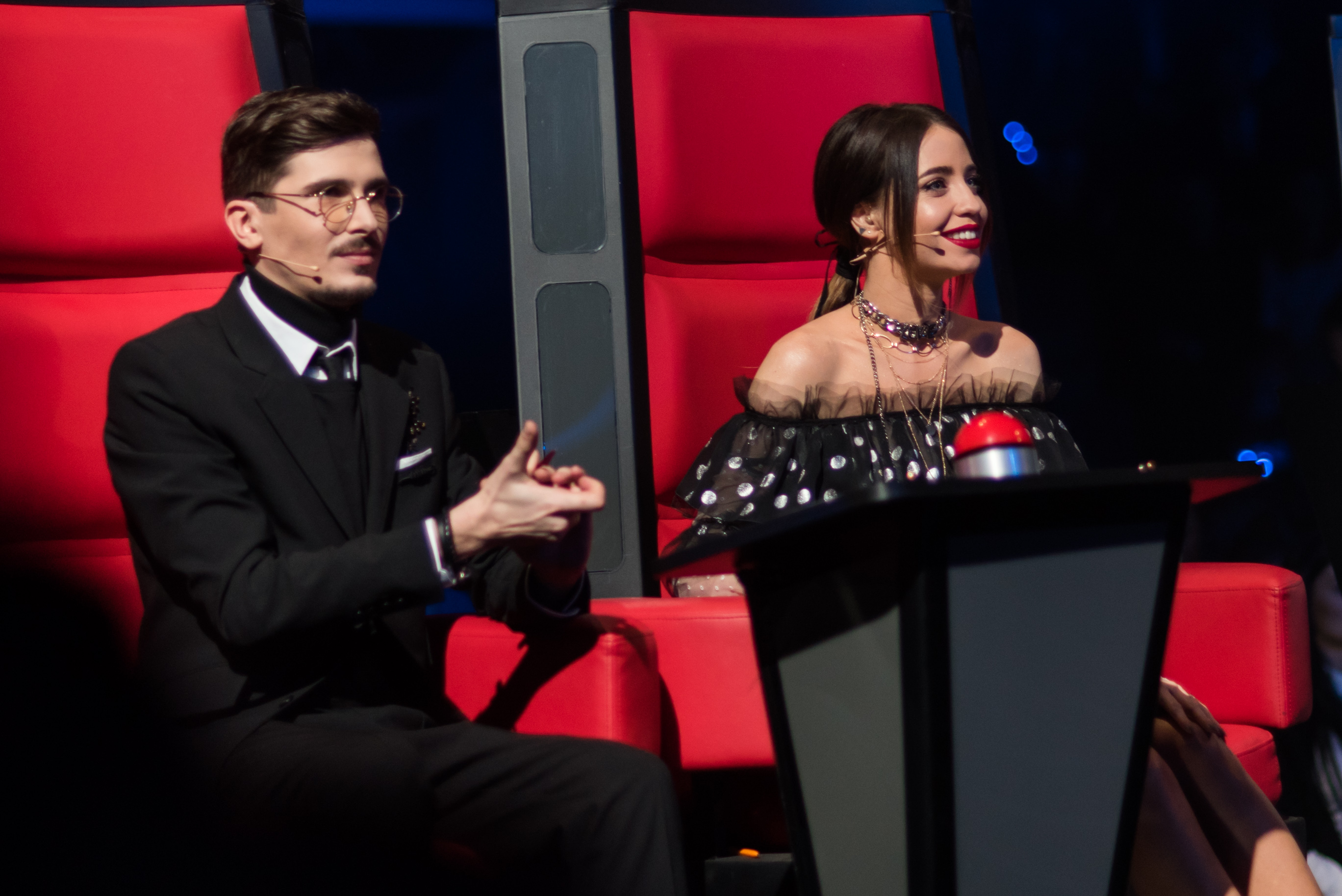 Финал Голос. Дiти 4. Время и Стекло